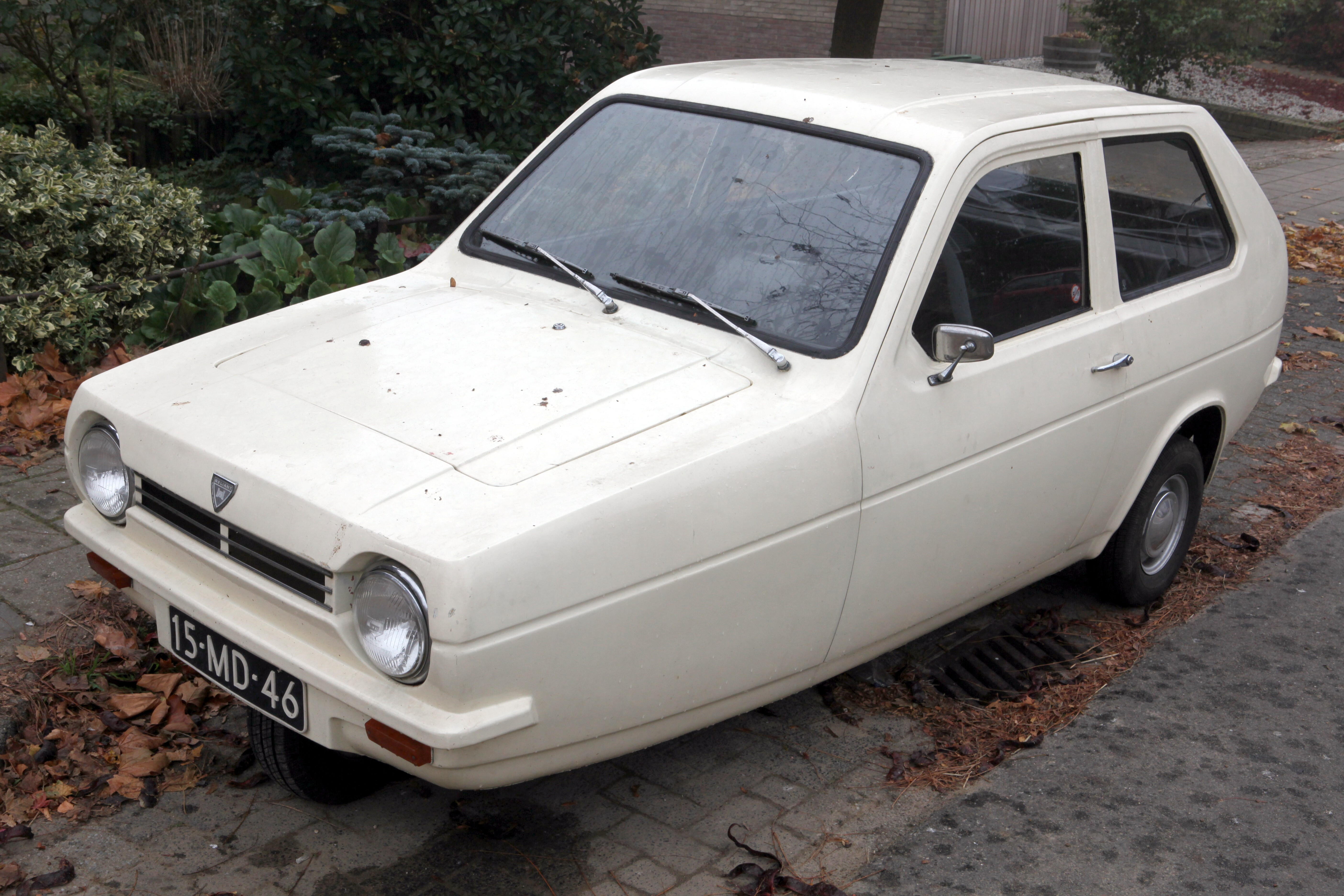 Reliant Robin 850